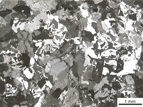 granofiro. nicol incrociati